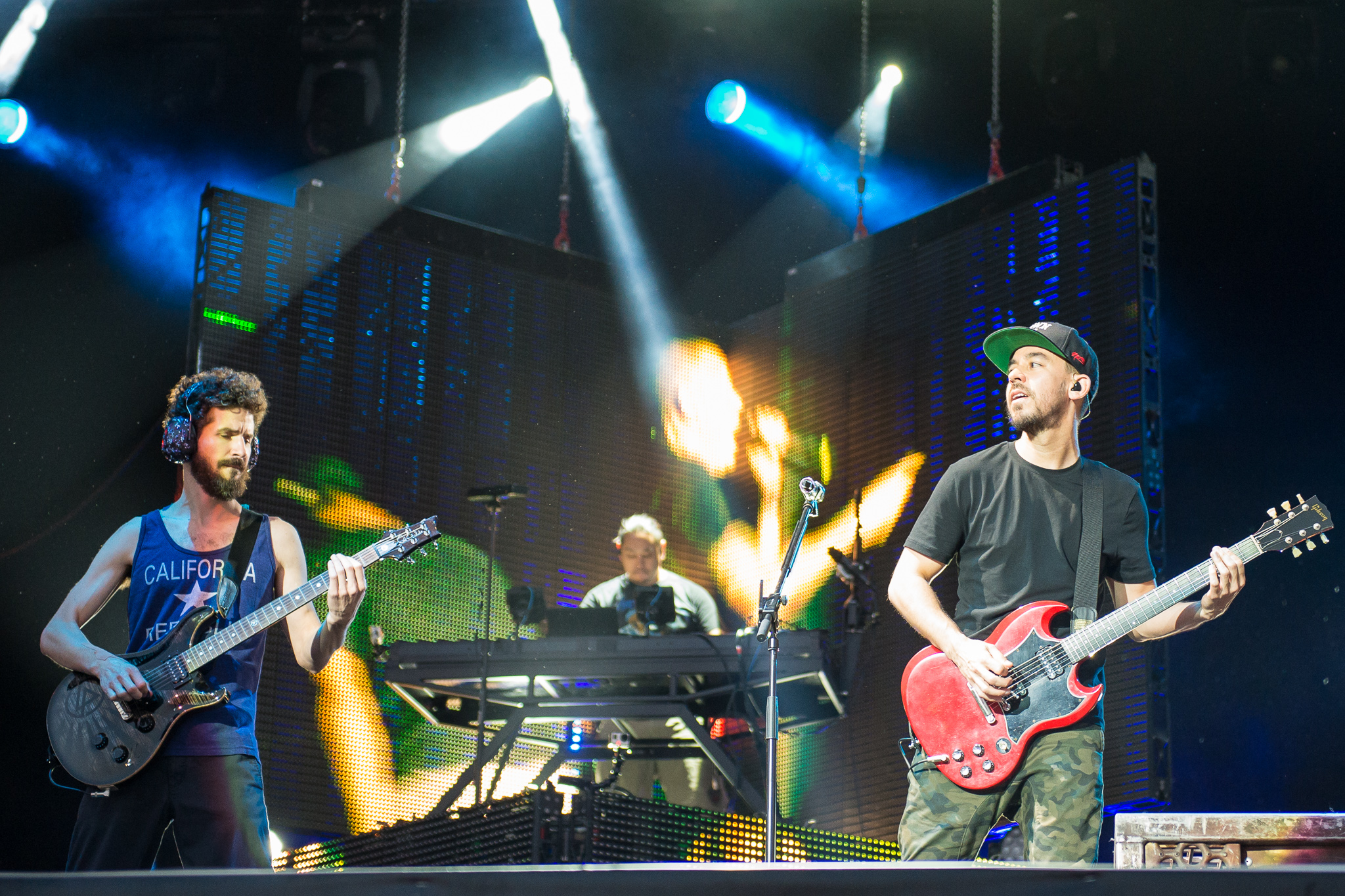 ARGO-Konzerte,Brad Delson,Centerstage,Konzert,Linkin Park,Livekonzert,Livemusik,Mike Shinoda,Musik,RiP,Rock im Park 2014